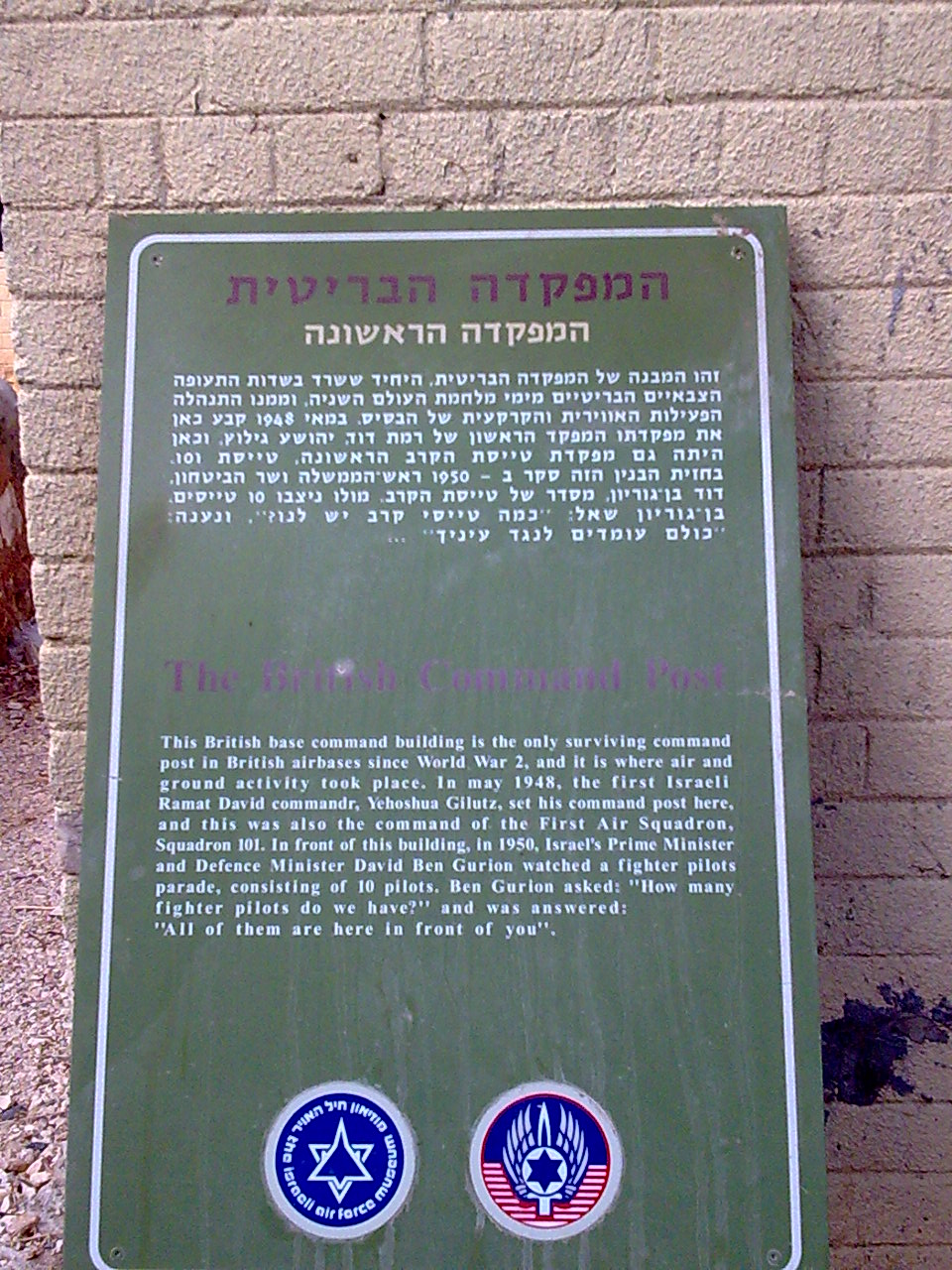 שלט המסביר על המפקדה הבריטית בבסיס רמת דוד.